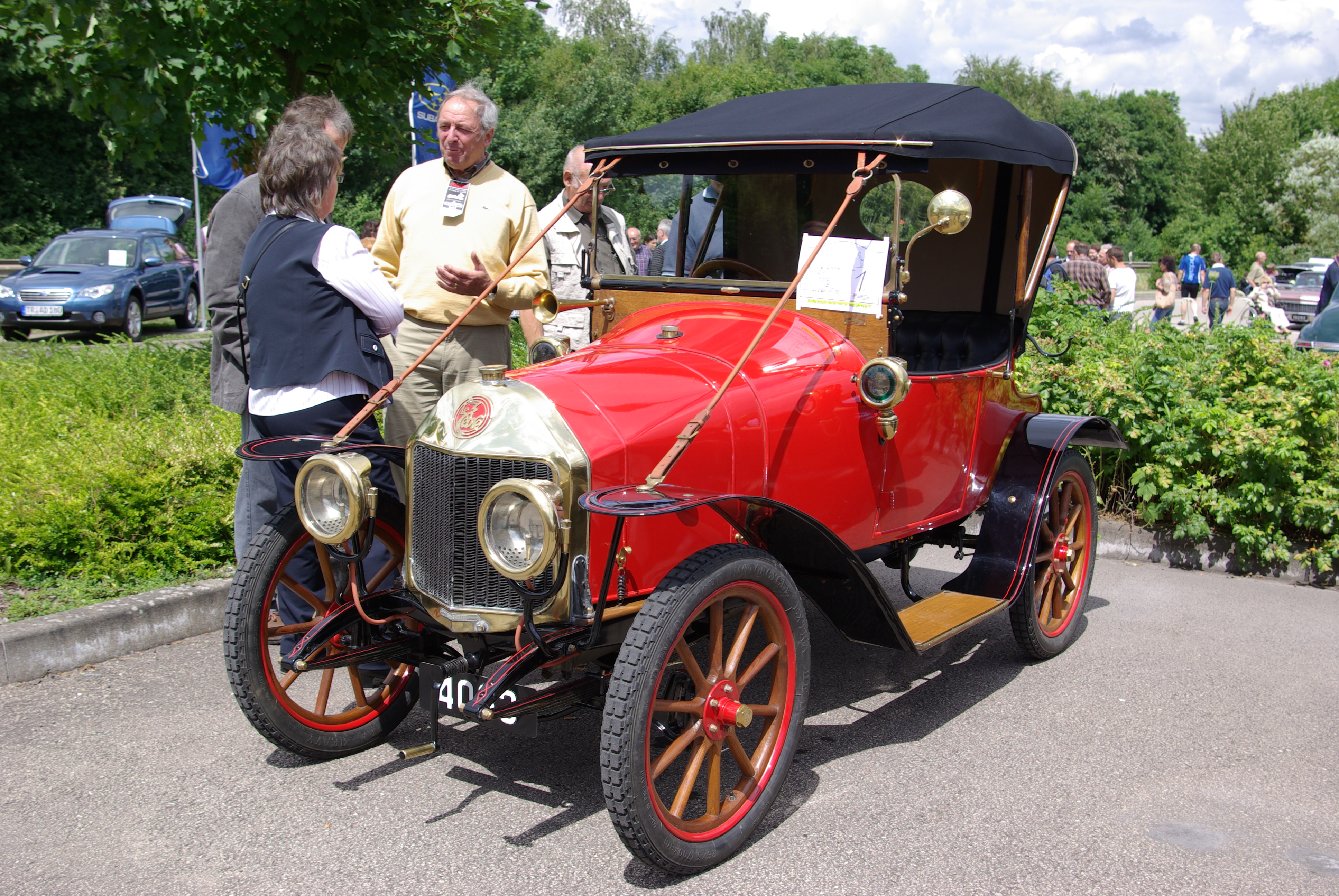 Le Zèbre C5 Baujahr 1913 Leistung 5 PS aufgenommen beim "Internationalen Konzer Oldtimer-Treffen" am 20. Juli 2008